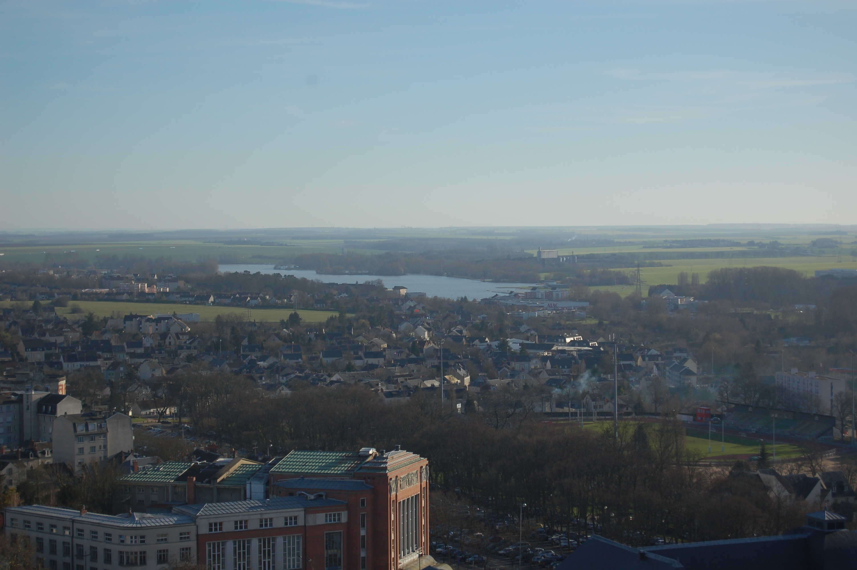 Bourges vue depuis la tour nord de la cathédrale vers le sud et lac d'Auron